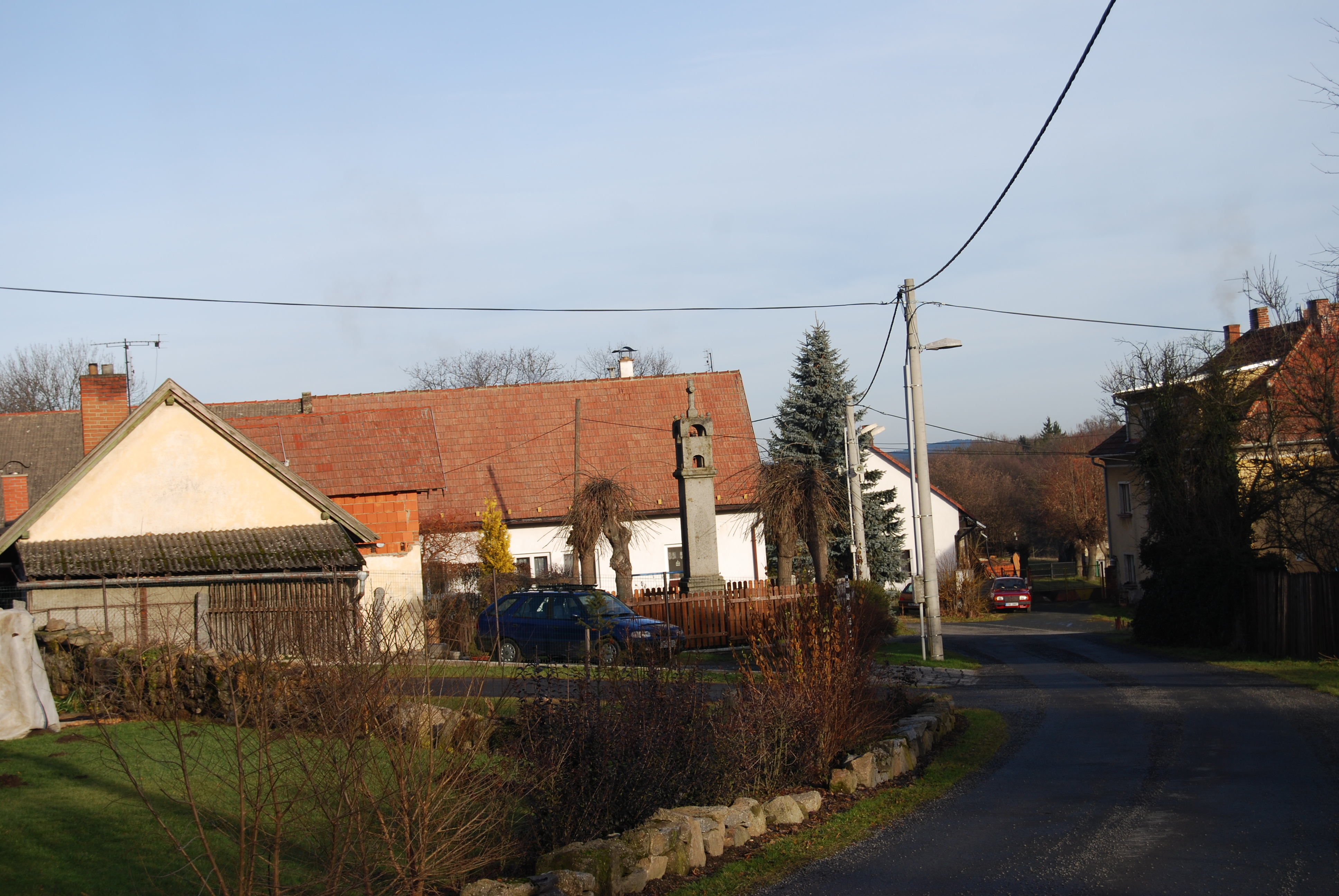 Pohled na náves. Vápenice je část obce Vysoký Chlumec v okrese Příbram. Česká republika.